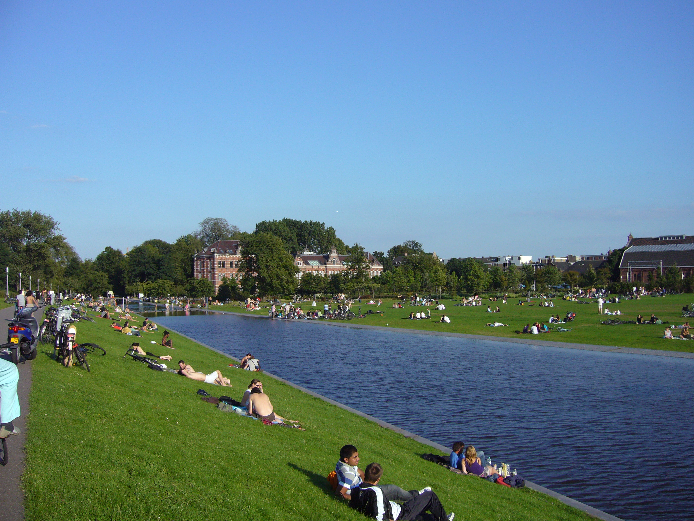 Westerpark in Amsterdam, summer of 2008